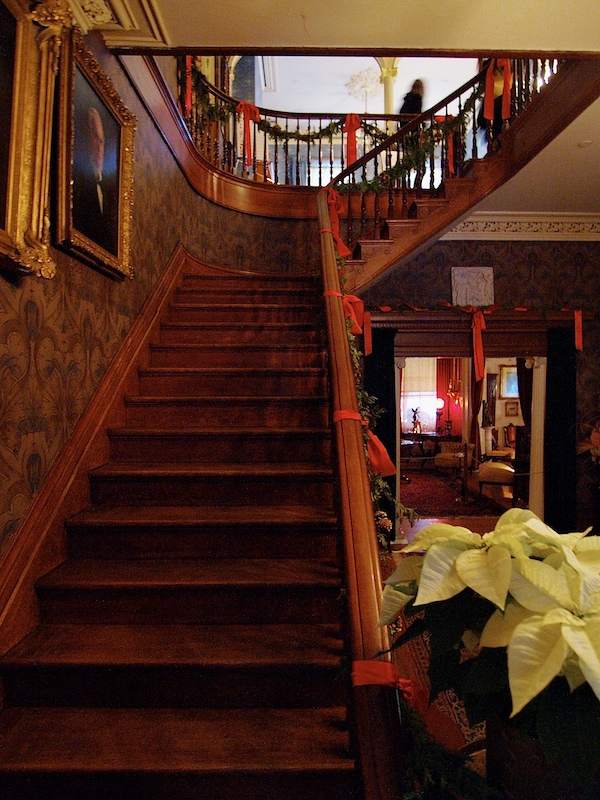 spadina museum '07